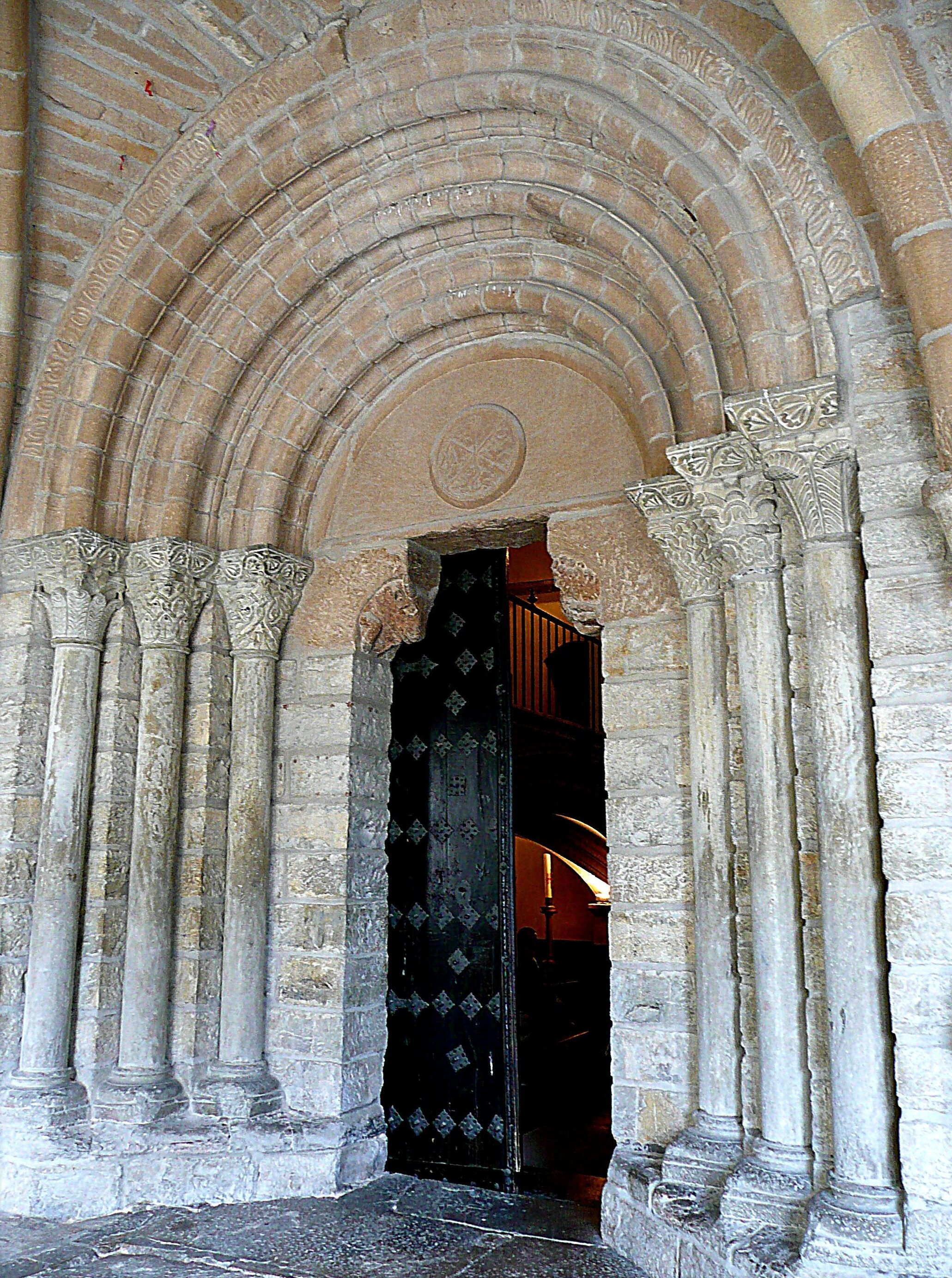 Portal de Acceso a la Iglesia de Nuestra Señora de la Purificación de Gazólaz.